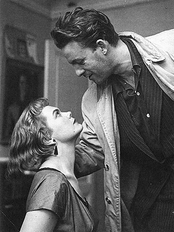 Fotografi av Berit Frodi och Alf Kjellin taget i samband med filmen Flicka utan namn (1954), infört i Myggans Nöjeslexikon band 6 (1990) (s. 195).